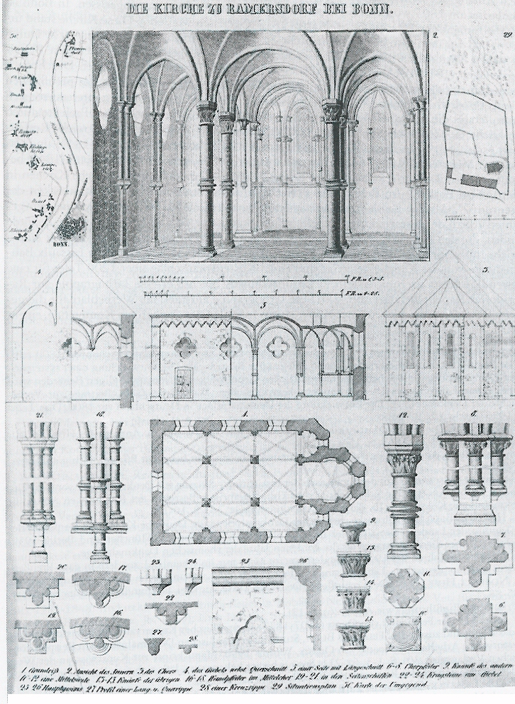 Lithografie der Georgskapelle (Bonn)